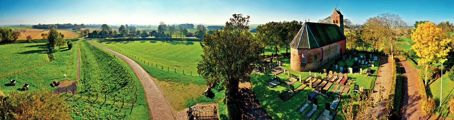 Terp, kerk, begraafplaats en kiepkarren in Hogebeintum (Hegebeintum. Kiepkarren werden gebruikt om terpaarde af te voeren(overigens van de andere kant van de terp). Fotografie: Roelof van der Schaaf